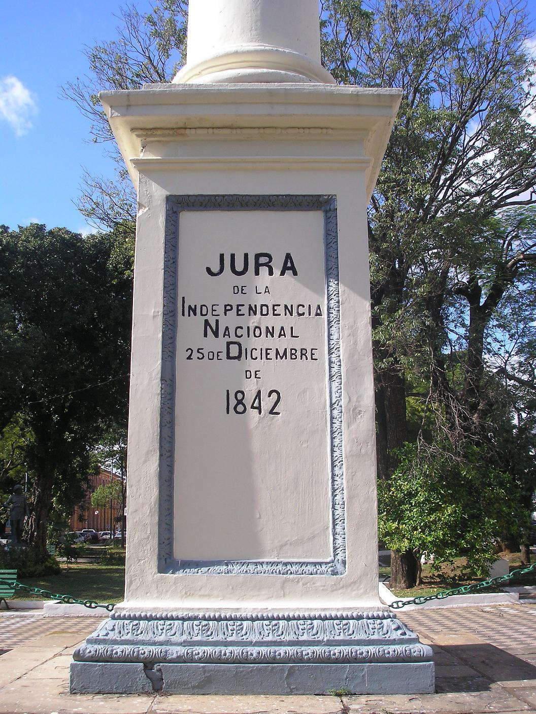 Monolito a la Jura de la Independencia Nacional de la República del Paraguay en el centro de la Ciudad de Asunción. Nombre del distrito de San Pedro del Ykuamandyju en el norte del país.